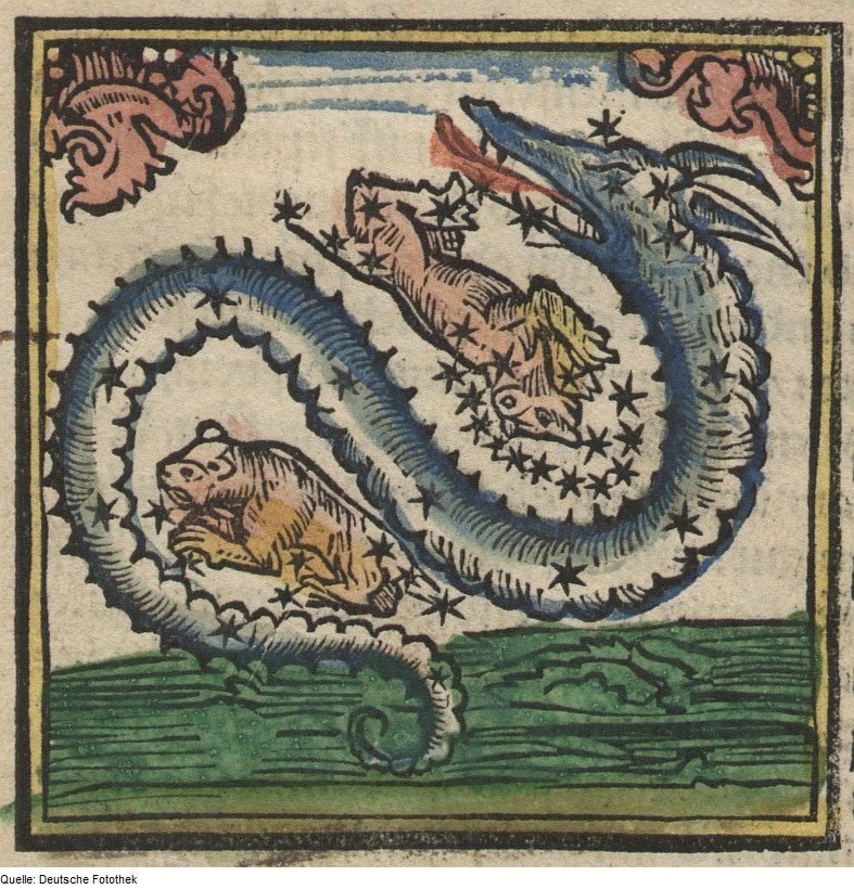 Original image description from the Deutsche Fotothek Astronomie & Sternbild